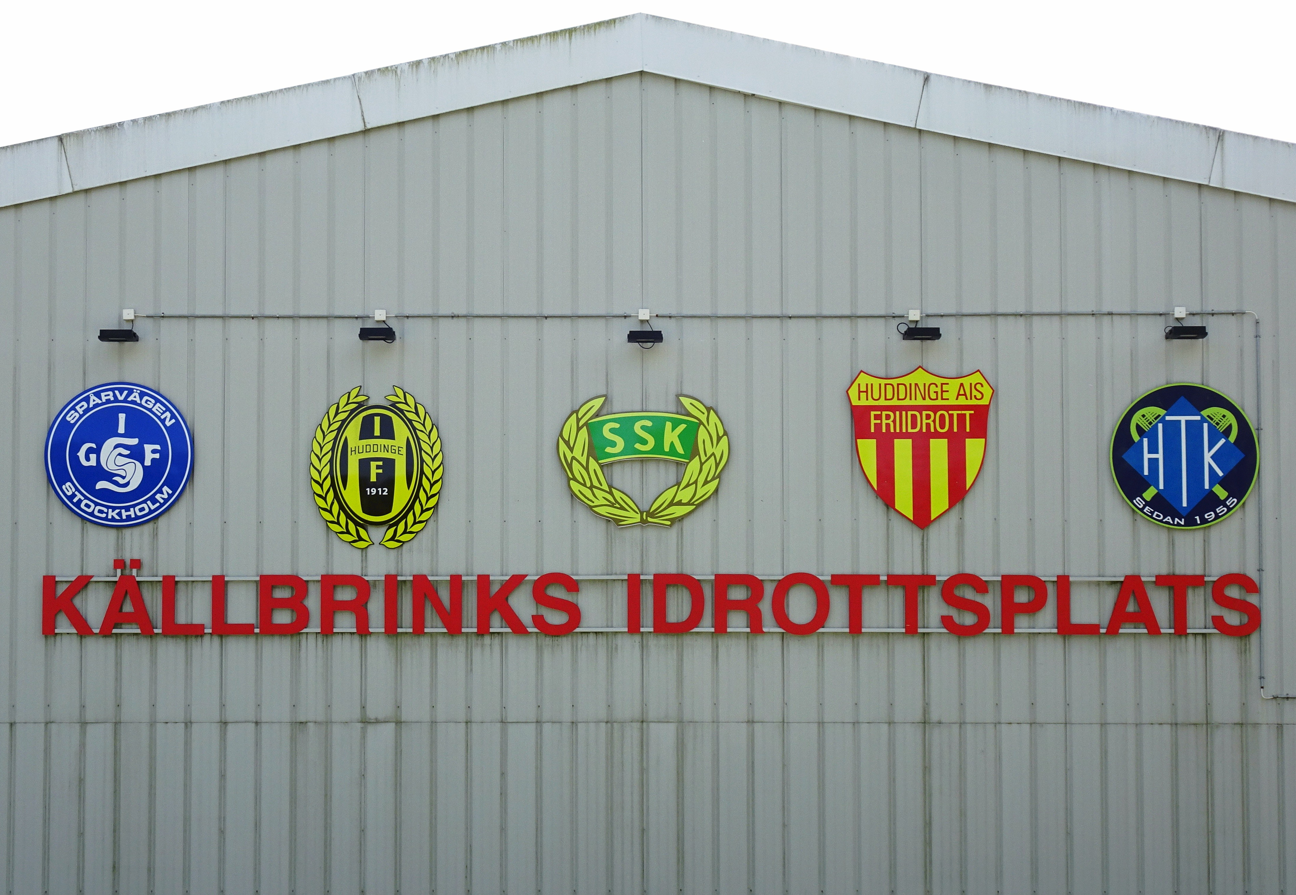 Källbrinks IP, Huddinge kommun